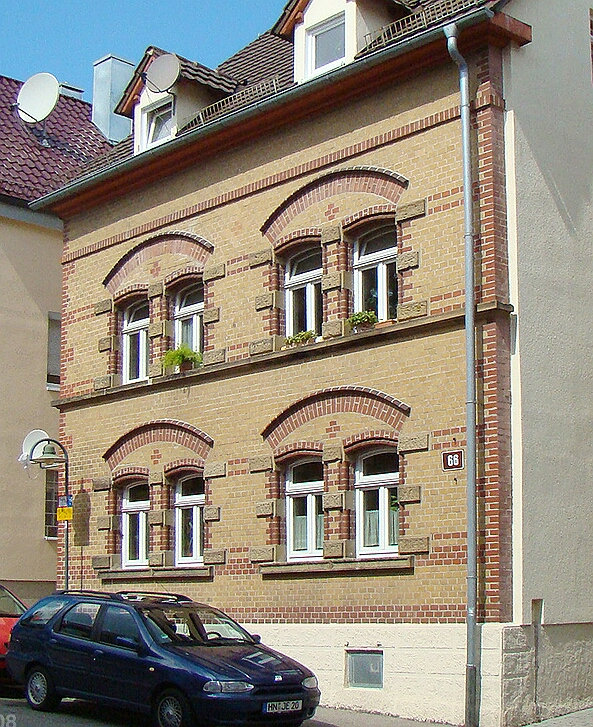 Detail der Fassade des Wohnhauses an der Eppinger Straße 66 in Heilbronn-Böckingen